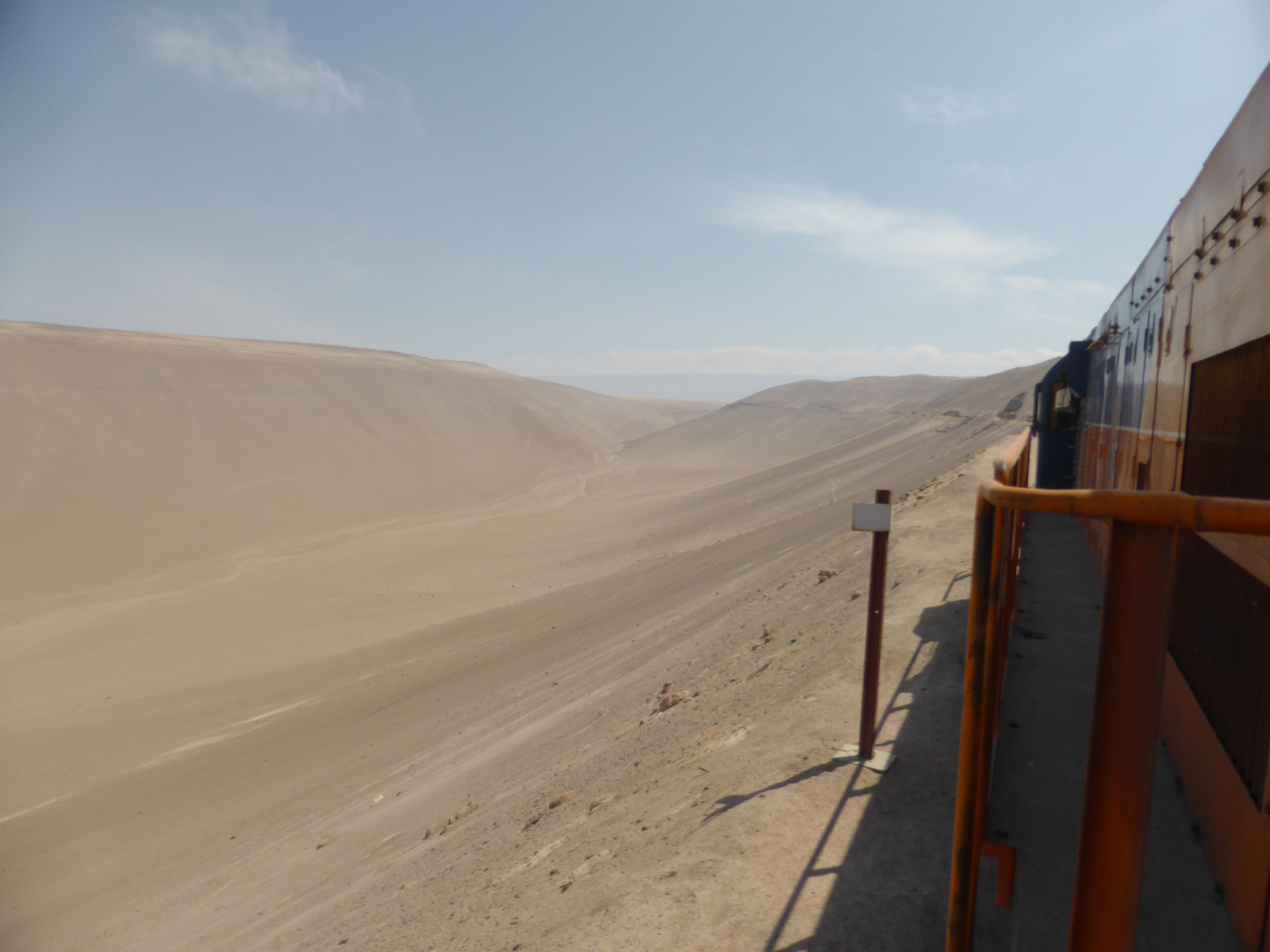 El antiguo Ferrocarril de Arica a La Paz (FCALP) ya no transporta mercancías. En el lado chileno se organizan viajes turísticos, con los recorridos: "Arica-Poconchile-Arica", y "Arica-Central-Arica". "Central" era una antigua maestranza o talleres para mantener las locomotoras de vapor, de cremallera, a 1.401 metros de altura sobre el nivel del mar. Y a 70 kilómetros de Arica. En esta fotografía, el tren se dirige hacia "Central". La máquina es una diésel construida por General Electric (GE), del año 1967, modernizada. Ancho de vía 1000 milímetros, o "trocha métrica". Vía estrecha de un metro. FCALP 18102. Área desértica colindante con el desierto de Atacama.